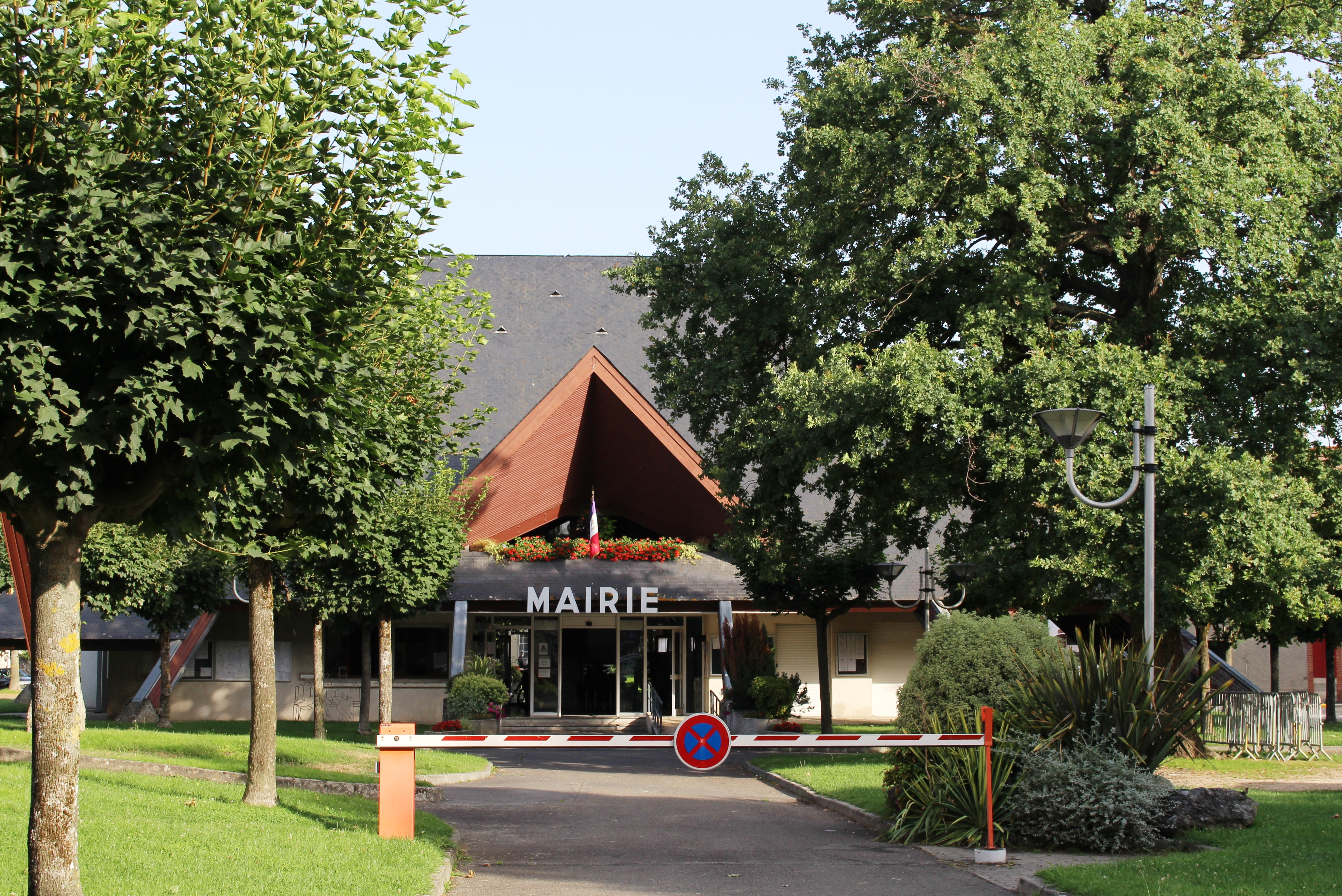 Mairie de Bordères-sur-l'Échez (Hautes-Pyrénées)